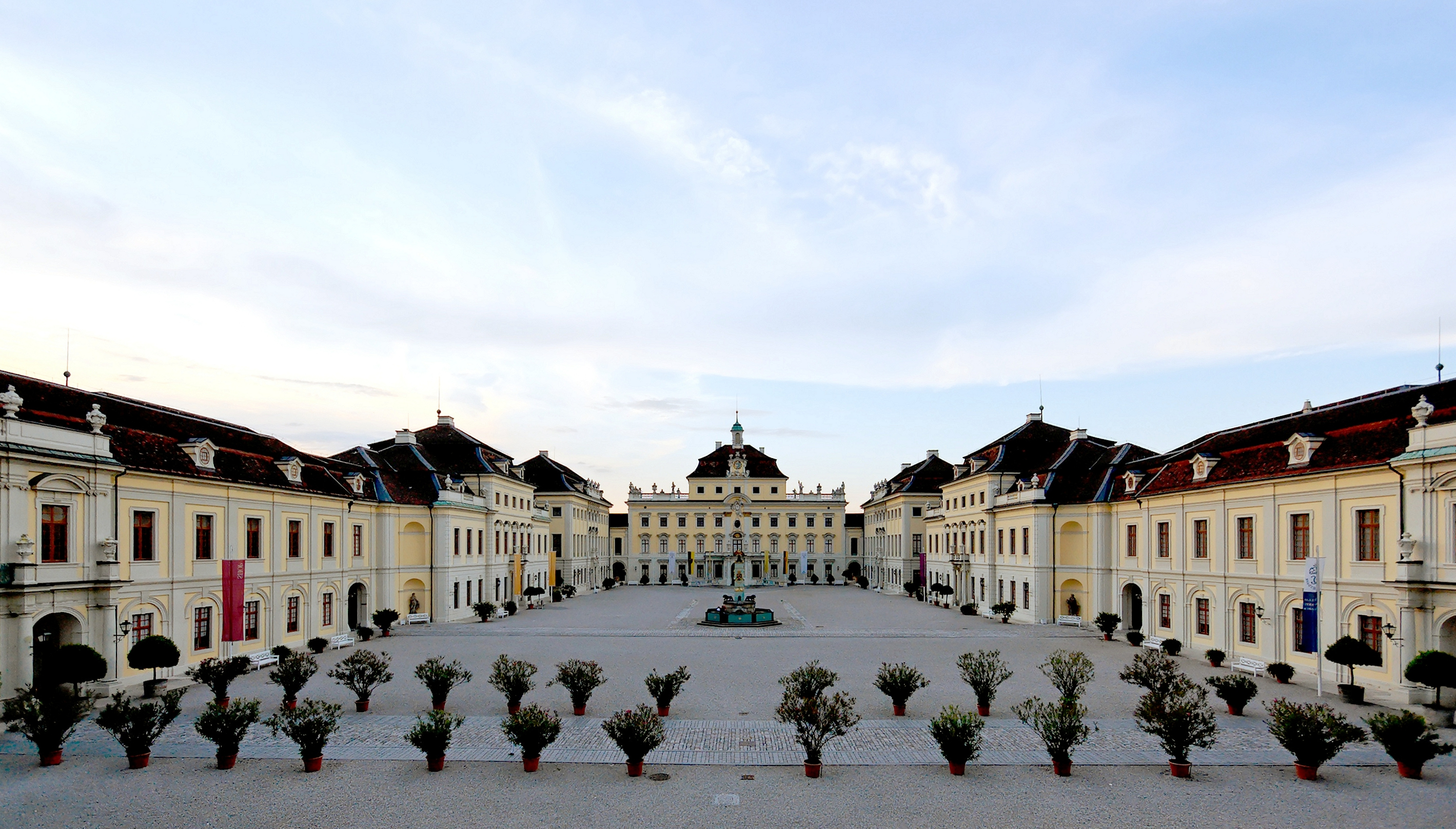 Ehrenhof des Residenzschlosses Ludwigsburg